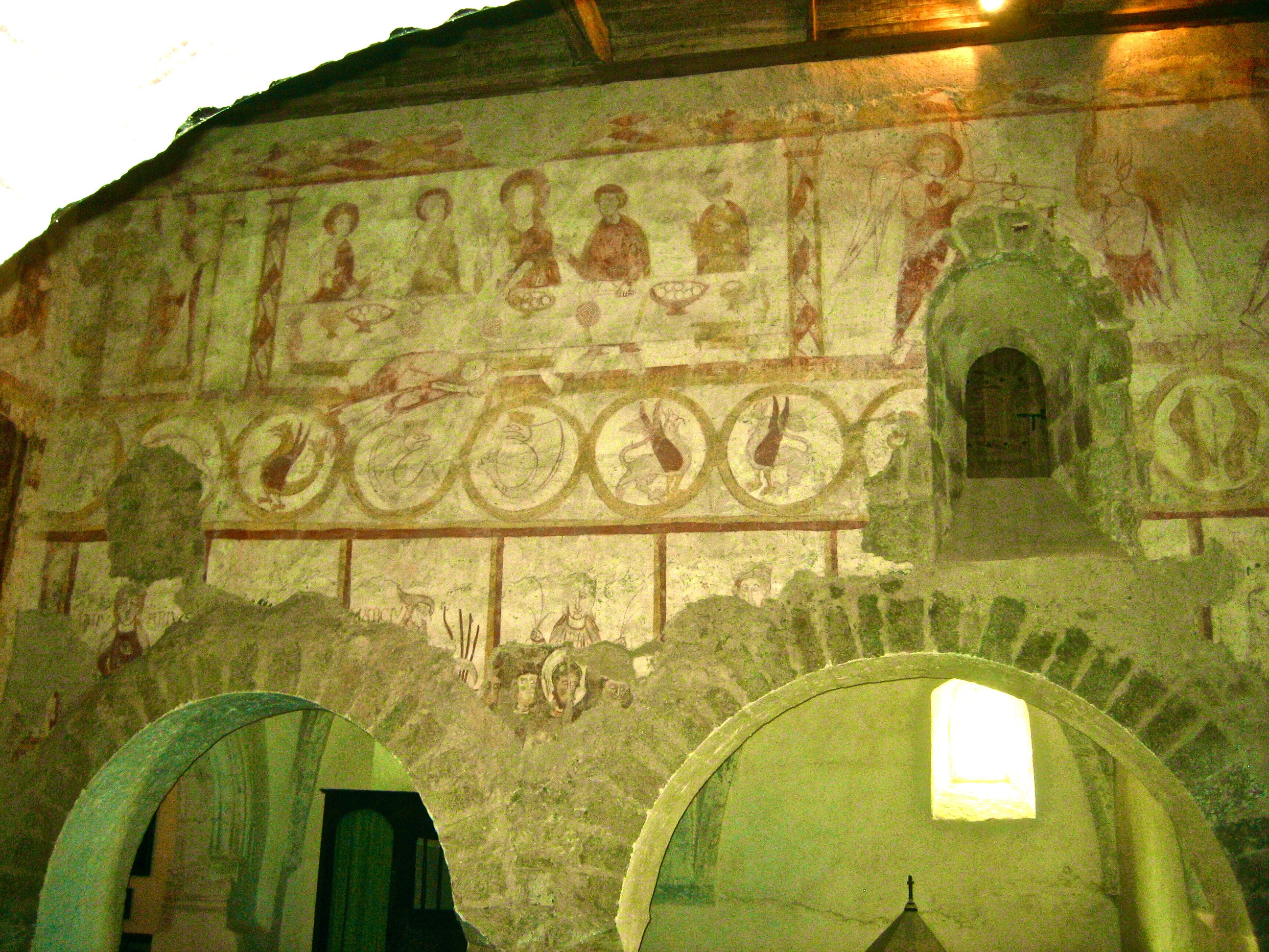 Église Saint-Laurent de Lourouer Saint-Laurent: disposition des fresques du sud